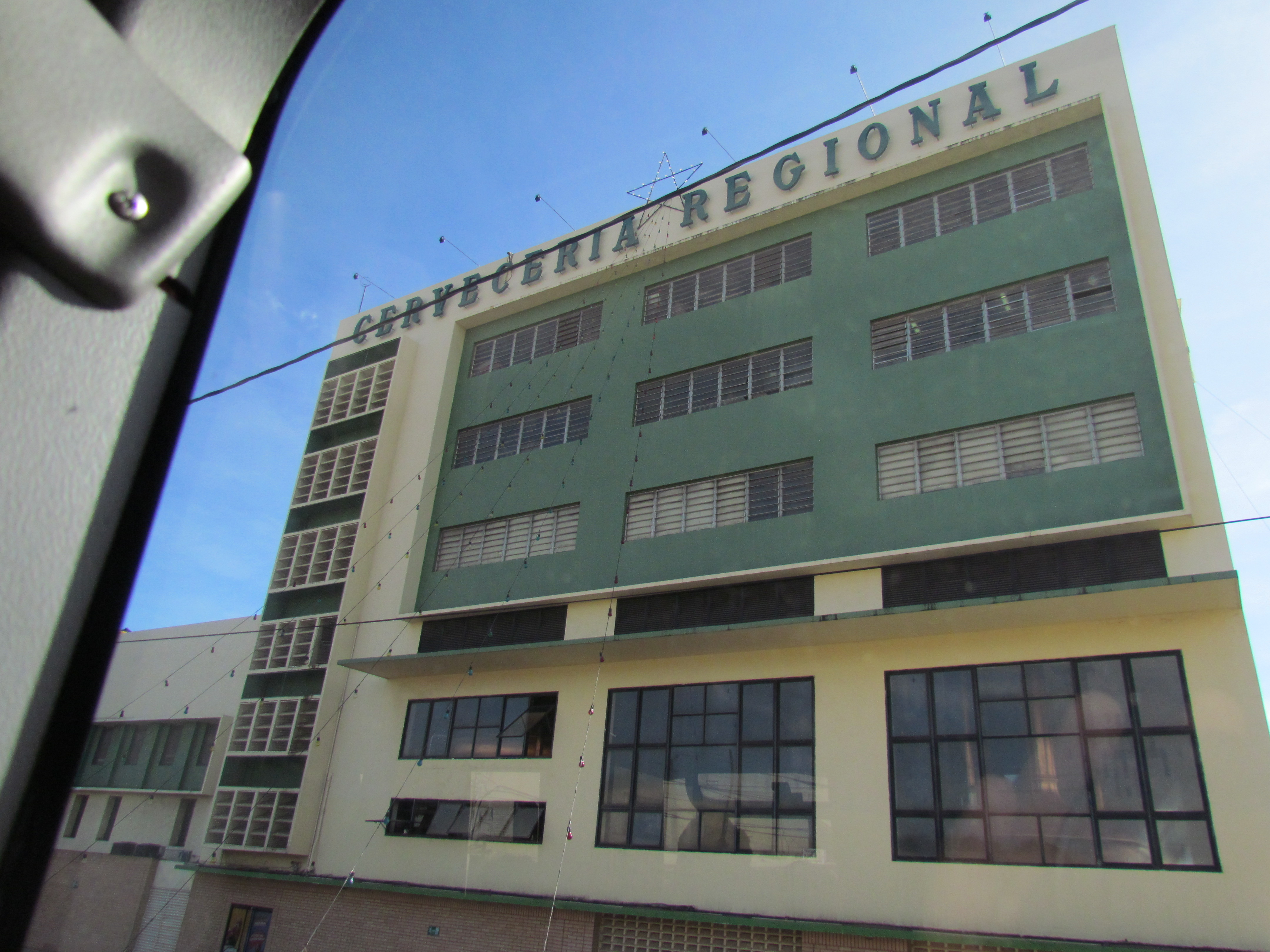 Cerveceria La Regional, Maracaibo, Venezuela